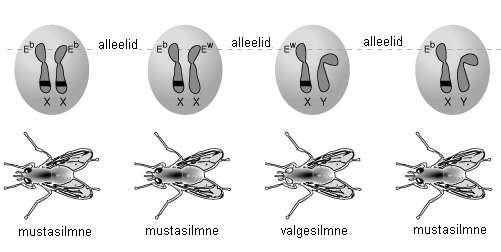 Genotüübi näide kärbse näol